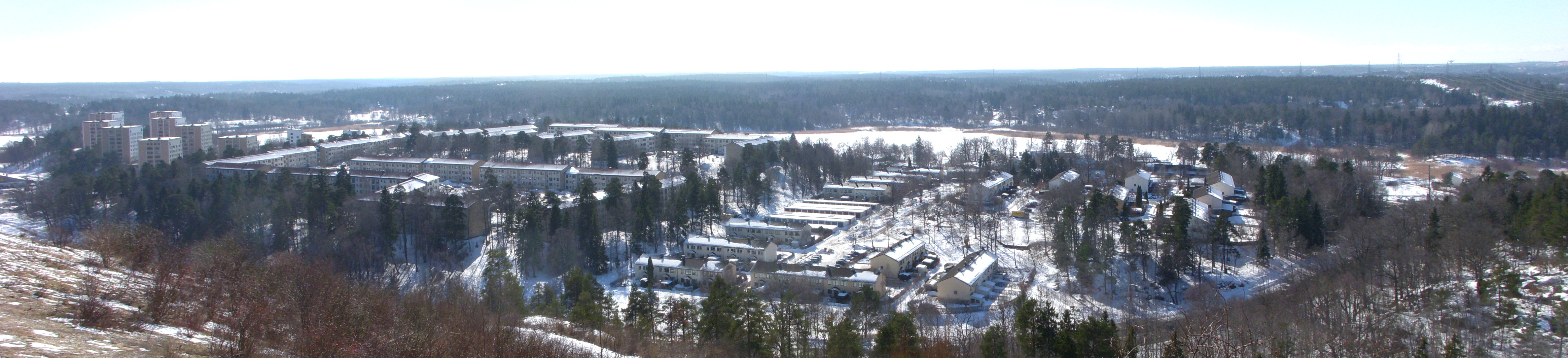 Panorama över Fagersjö från Högdalstoppen